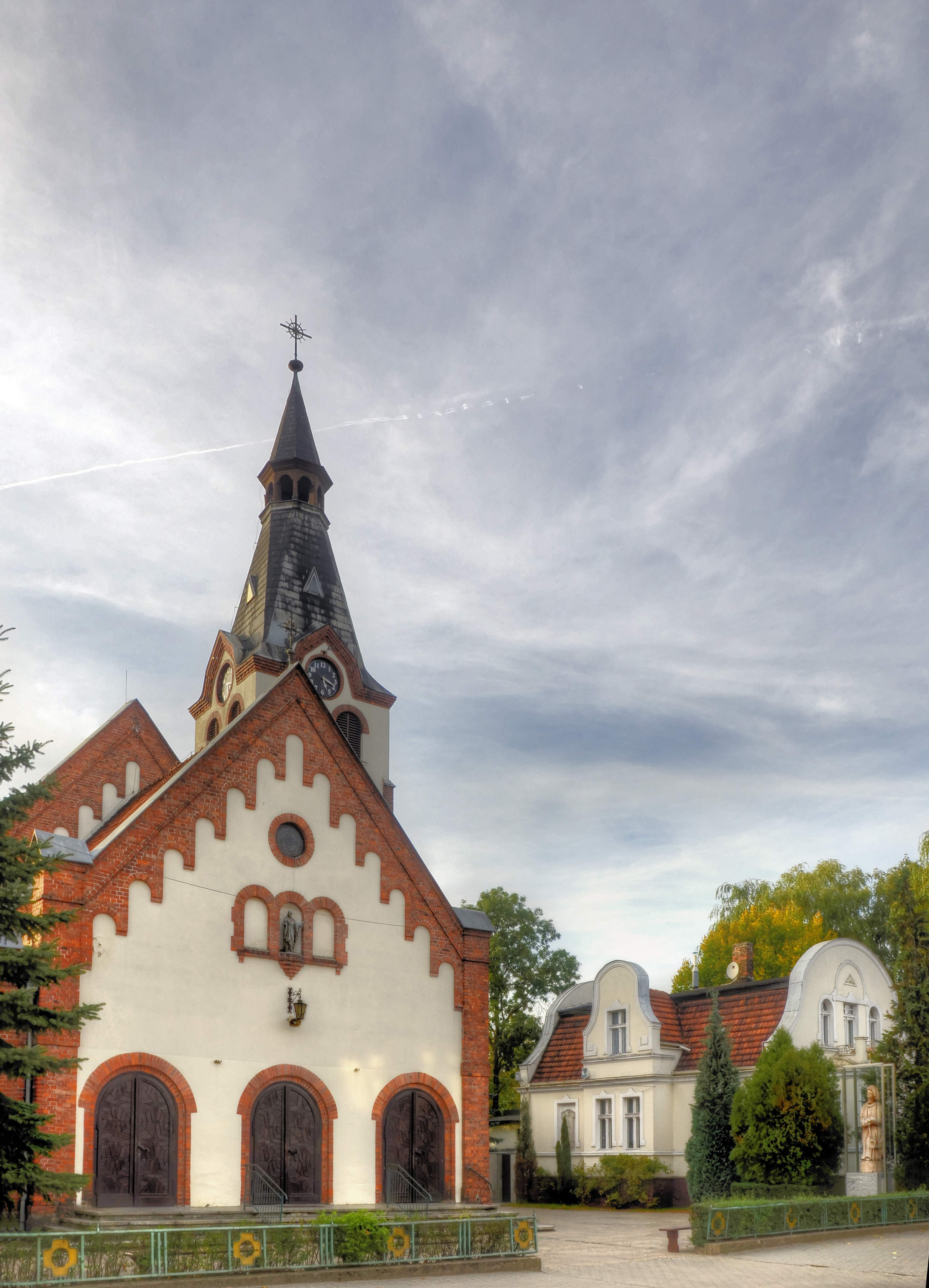 kościół par. pw. MB Nieustającej Pomocy z 1896 r. Nowy Tomyśl, ul. Piłsudskiego 33, Nowy Tomyśl